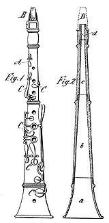 A 13545-ös lajstromszámú szabadalmi leírás ábrája